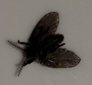 Familia Psychodidae de diferente perspectiva